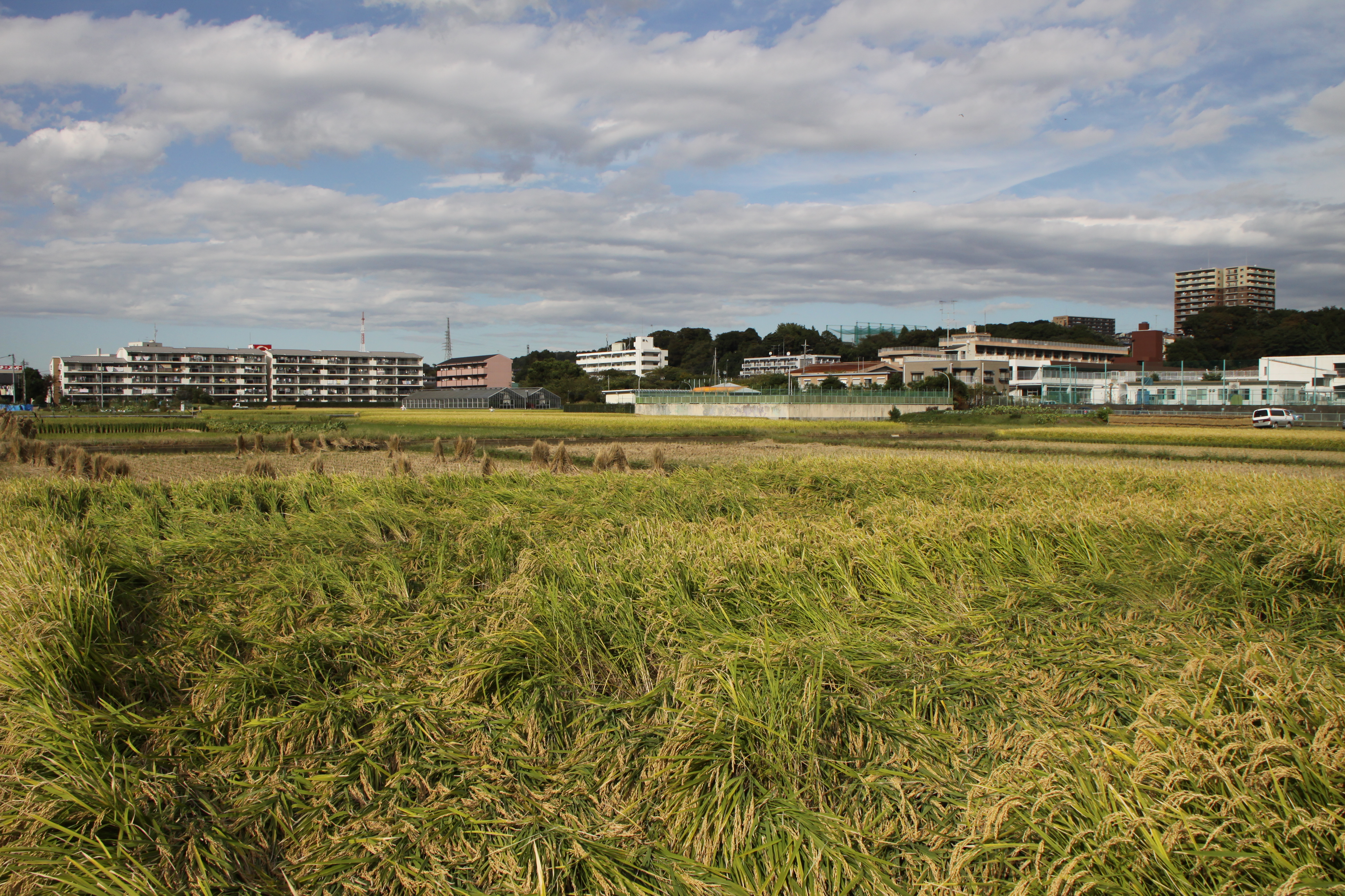 台風によって倒伏した稲。神奈川県相模原市で撮影